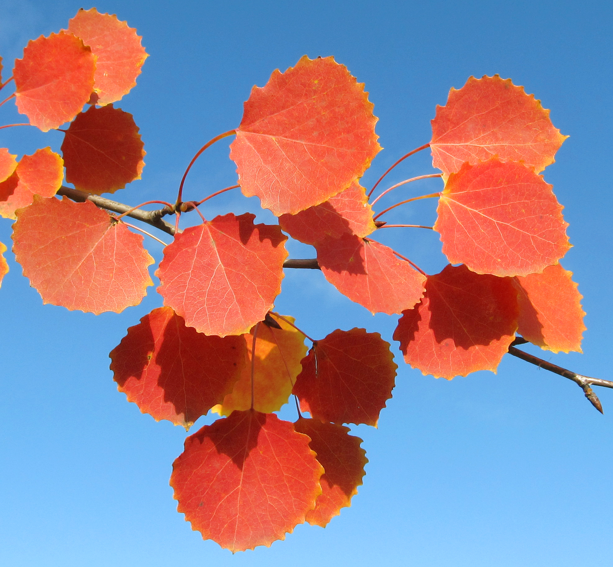 Populus tremula Осина в Санкт-Петербурге Осенние листья